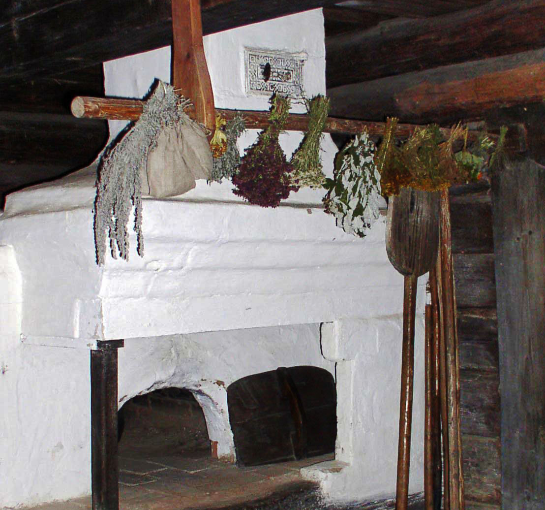 Сушка трав у печи. Белорусский государственный музей народной архитектуры и быта.